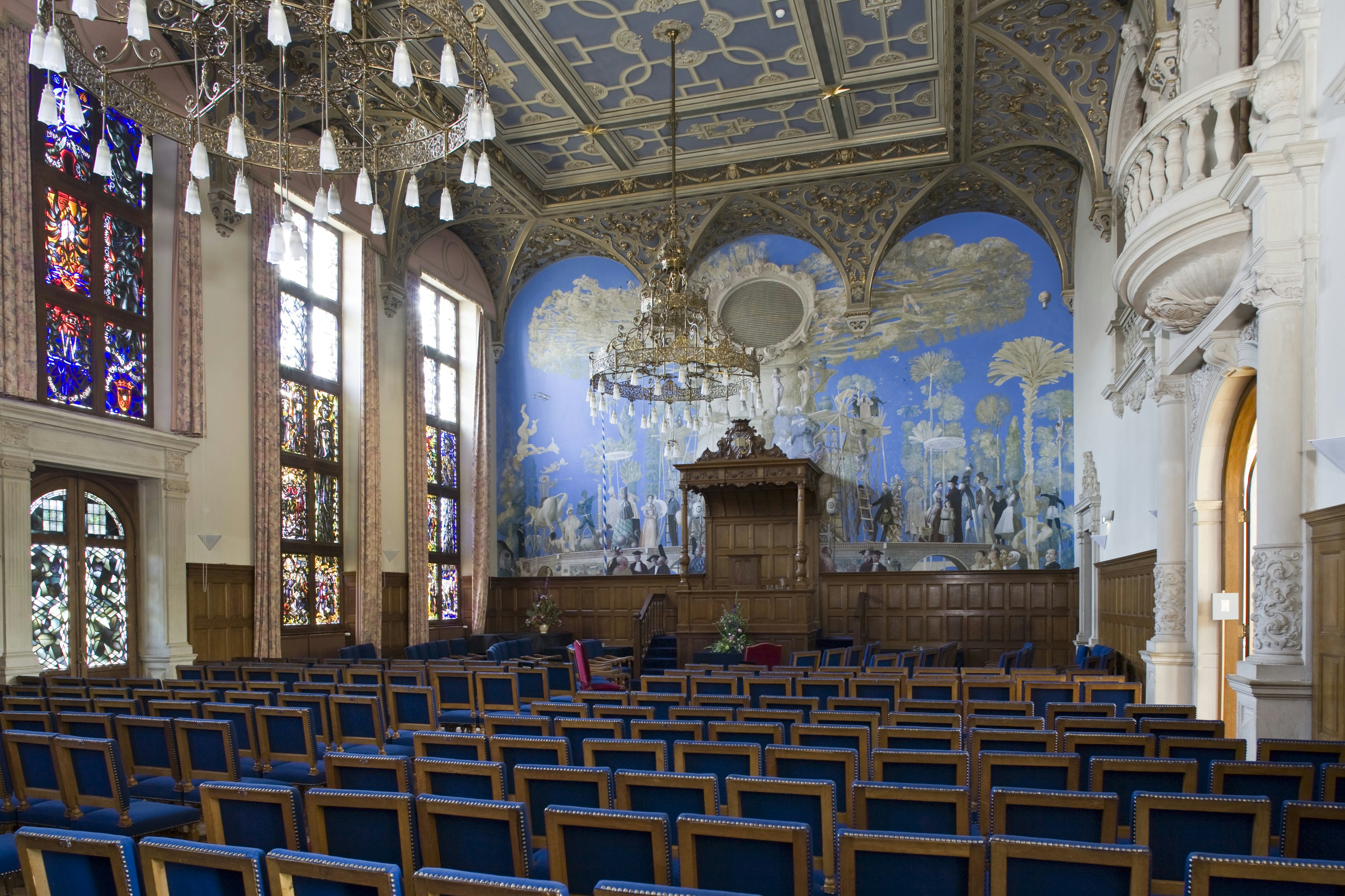 Universiteitsgebouw: Interieur, overzicht van de Aula. De muurschildering ‘De boom der kennis’ van de Groningse kunstenaars Matthijs Röling en Wout Muller is van 1987 en kwam tot stand met behulp van het Representatie fonds van hoogleraren. Op de schildering zijn onder anderen de gezichten van prof. mr. B.V.A. (Bert) Röling (Hoogleraar polemologie en vader van Matthijs) en prof. dr. H.W. (Henk) van Os (initiatiefnemer voor de muurschildering) te herkennen.